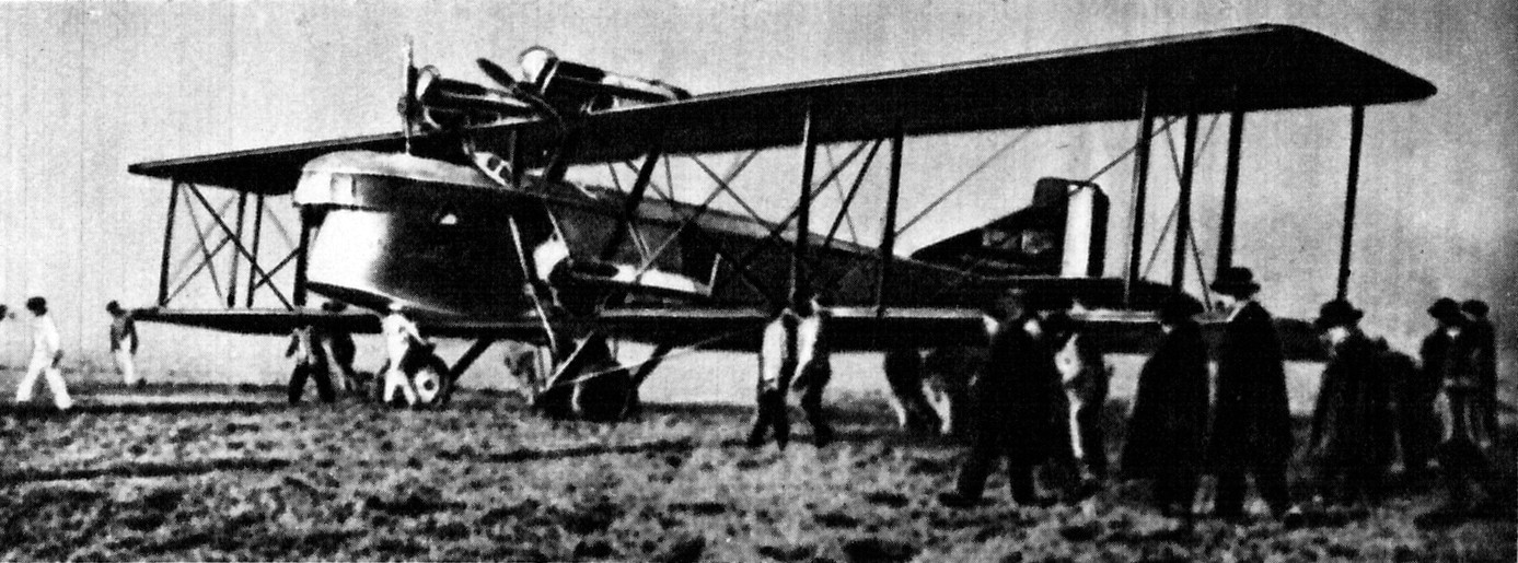 Francuski samolot bombowy i transportowy Blériot 115.